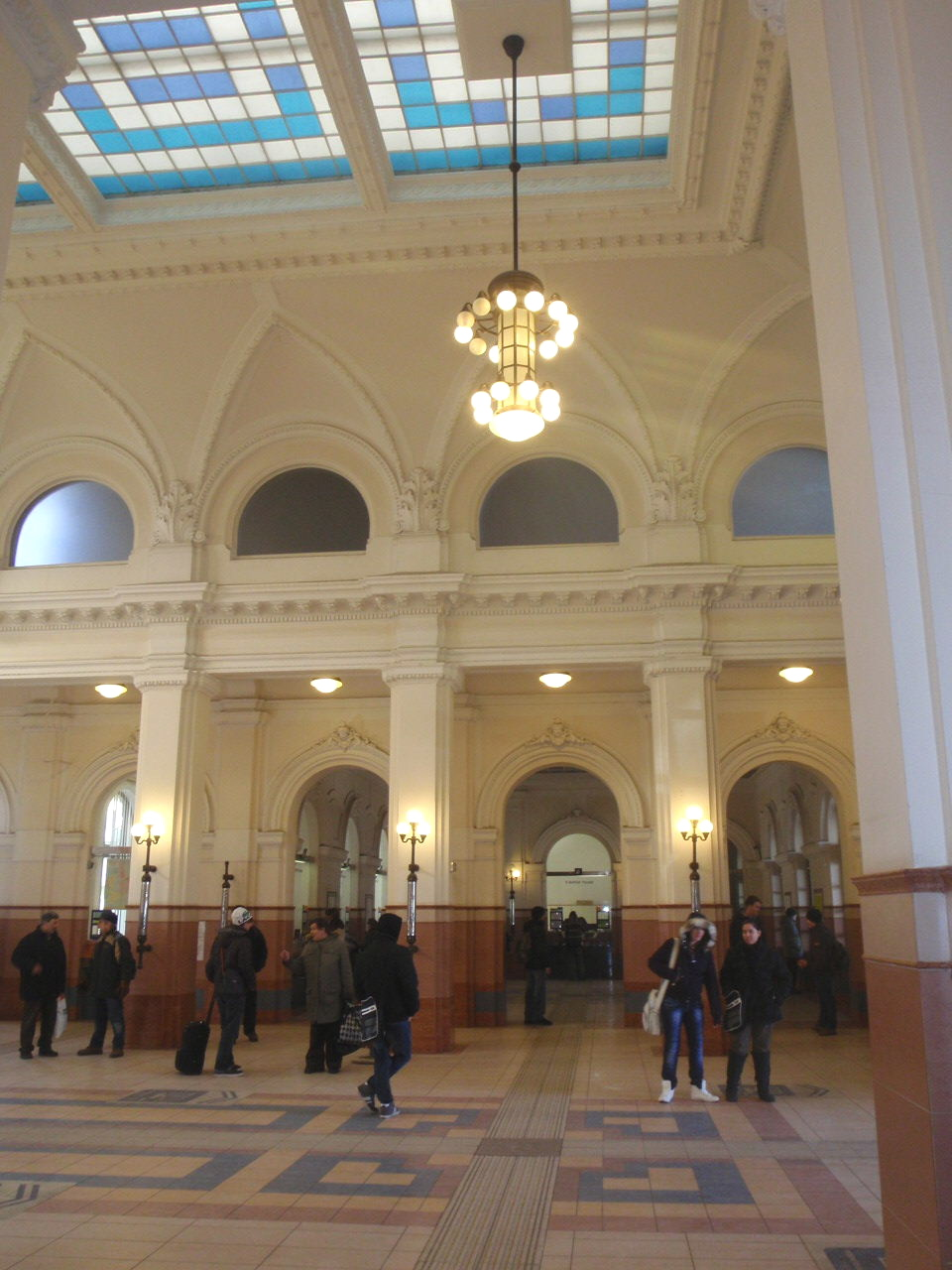 Szomabthely pályaudvar pénztárterem